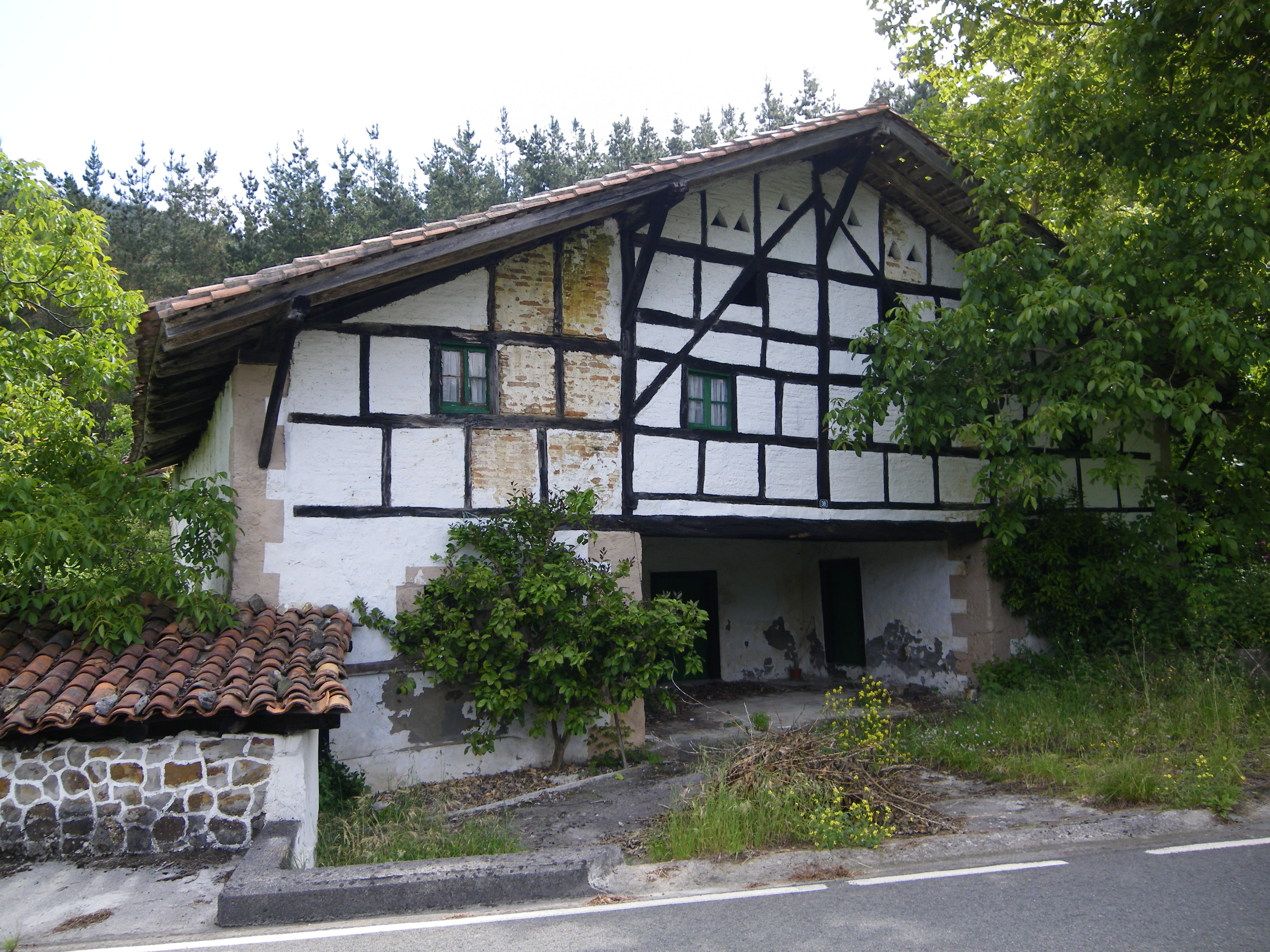 Matxinena baserria, Munitibar-Arbatzegi-Gerrikaitz, Lea-Artibai, Bizkaia, Euskal Herria.